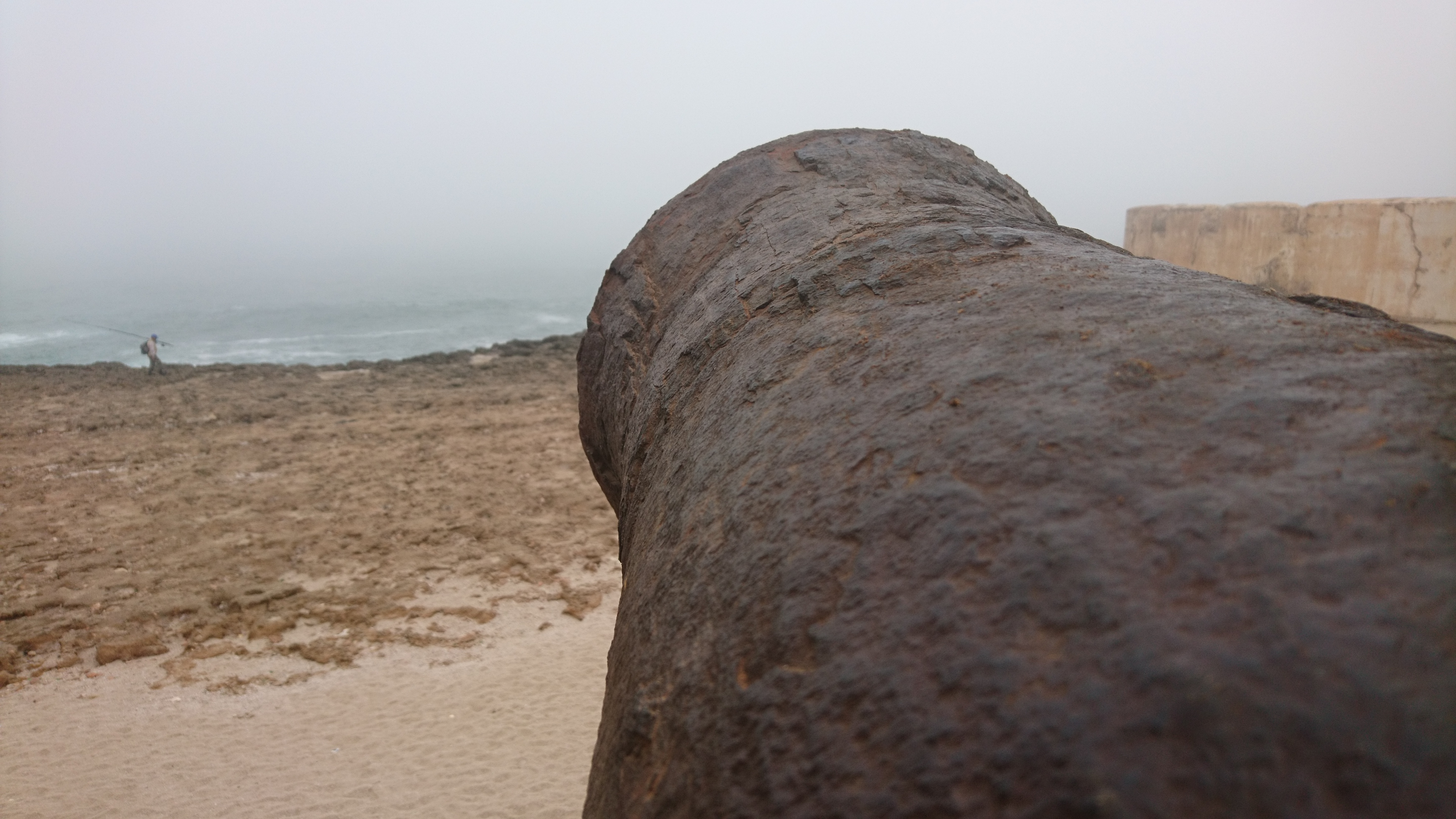 Maġribi: واحد المدفع فسلا عاطي على البحر